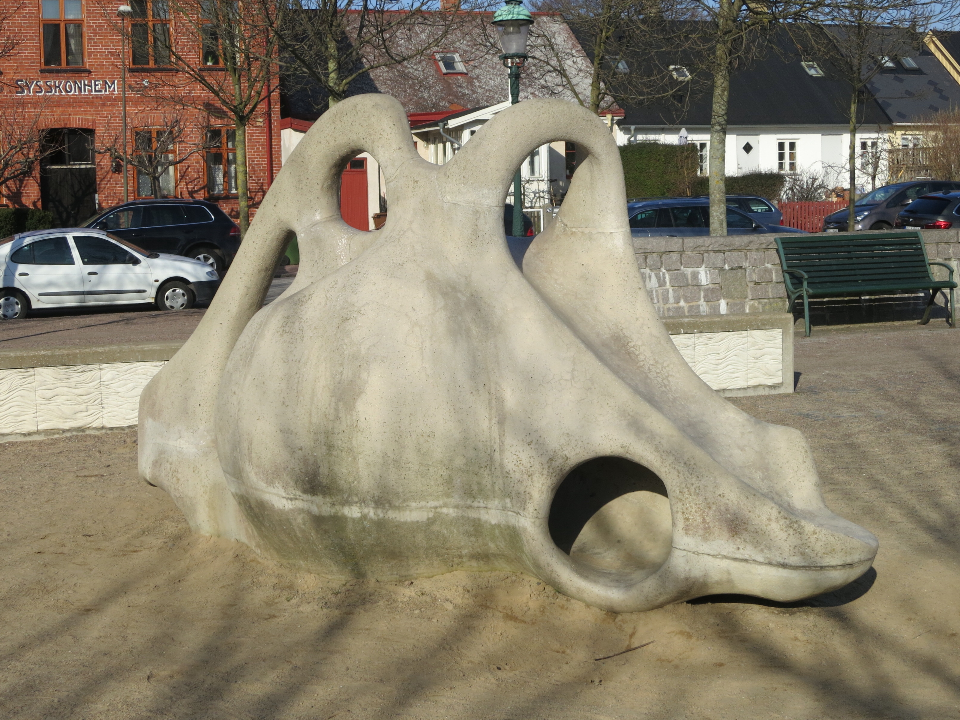 Tufsen av Egon Möller-Nielsen, skulptur i Limhamn, Malmö